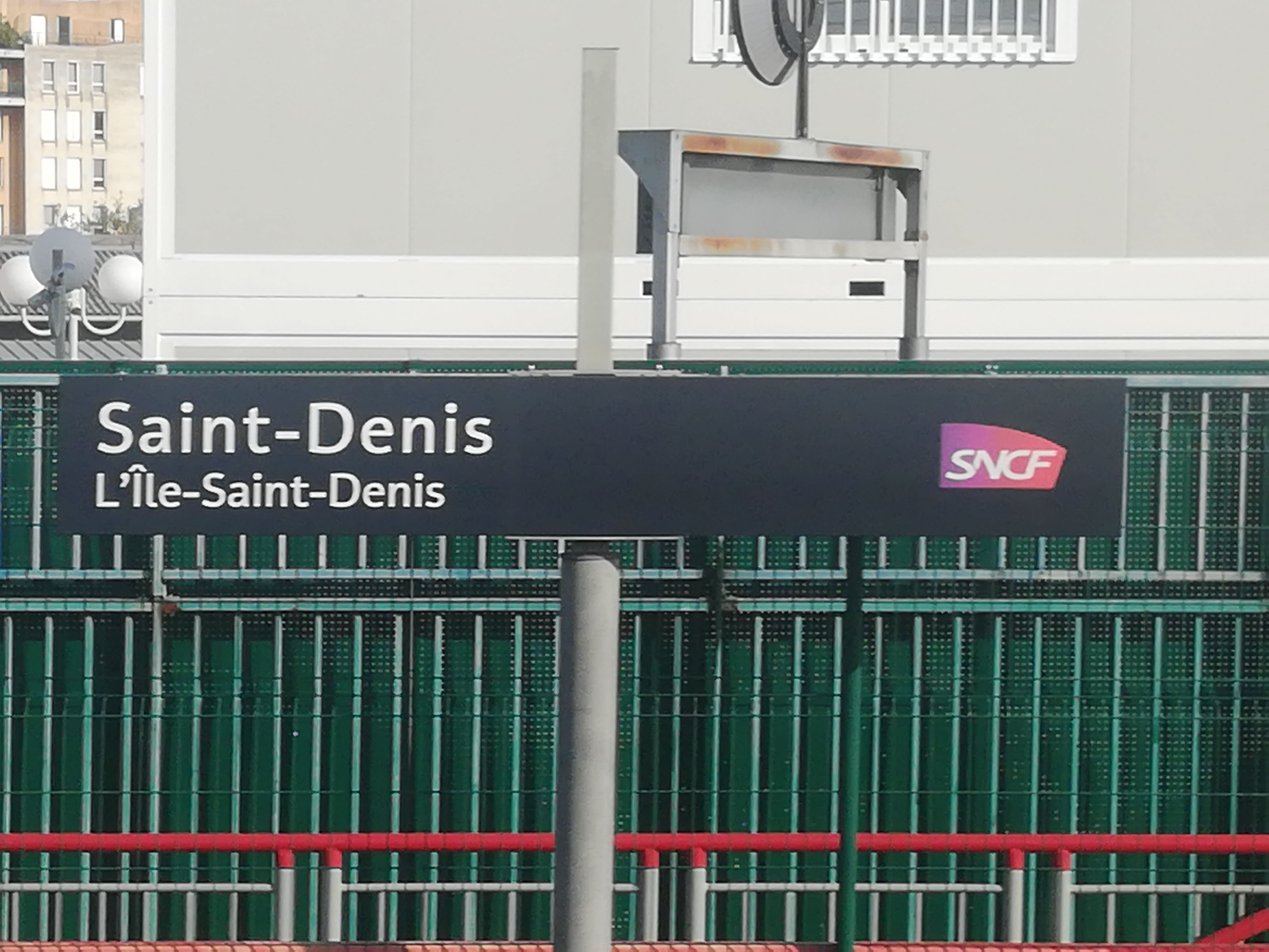 Plaque signalétique de la gare de Saint-Denis, en 2018.